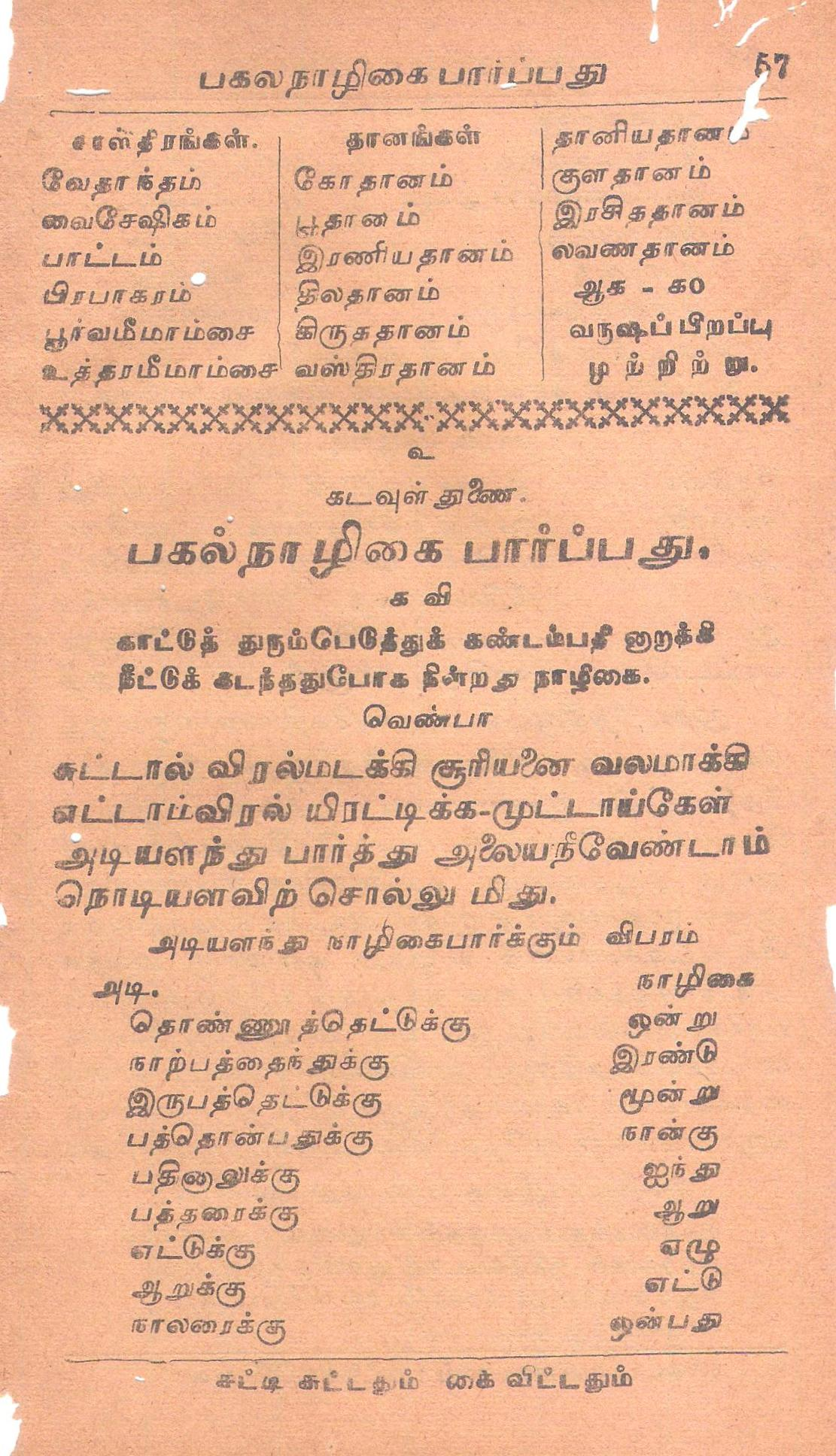 Tamils used to measure the division of a day by using any grass stem available at that place at times. They fold the stem into 16. They erect it folding in ‘L’ shape so as the shadow of the top of the ‘x’ stem to fall on the end of ‘y’ stem and calculate based on a calculation table already formed. Calculation table is given in a form Tamil song-poem in the document. தமிழர் பகலில் நாழிகை கண்டறிந்த முறைமையை விளக்கும் பாடலைக் கொண்டுள்ள ஆவணம்.